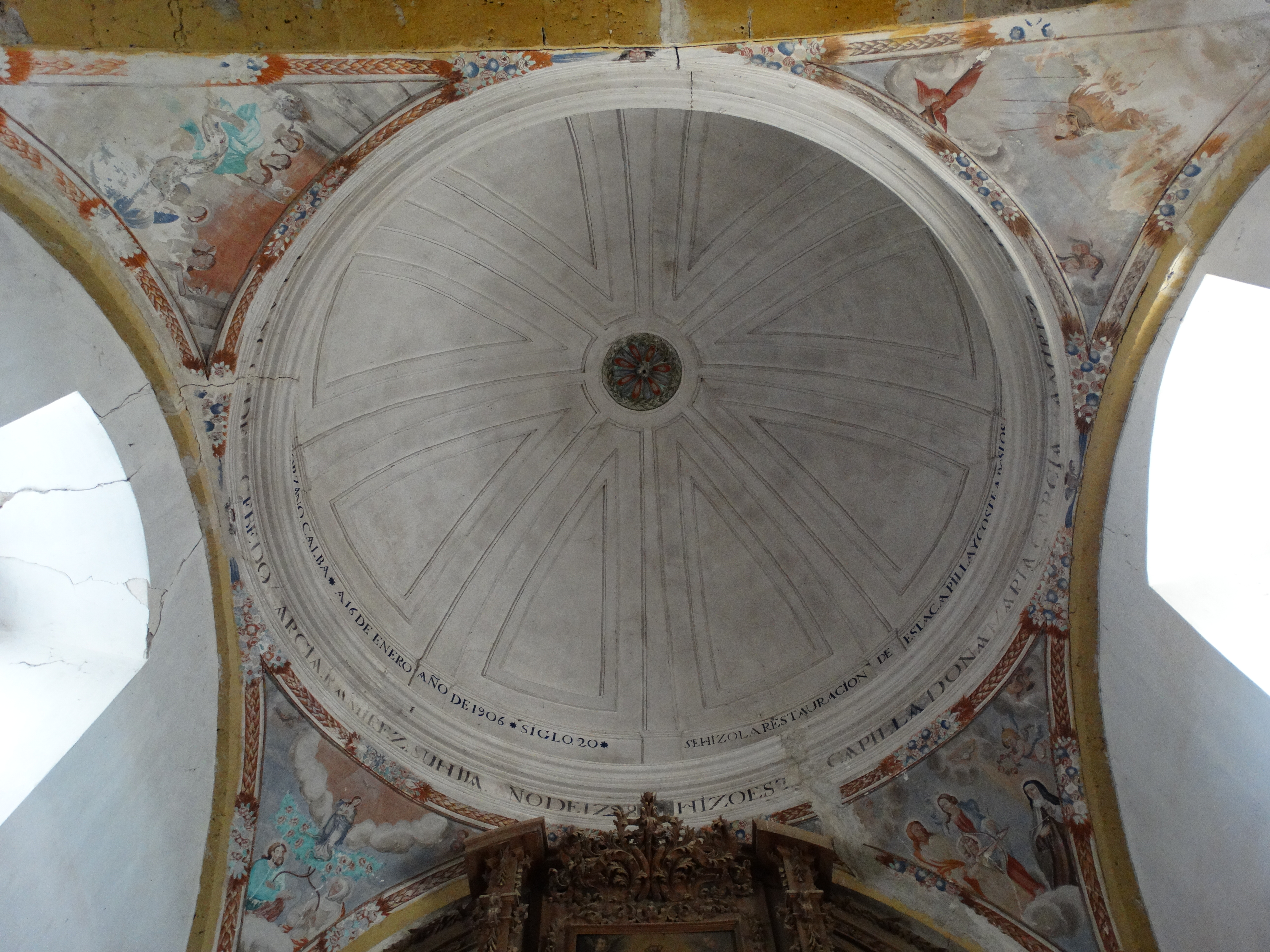 Torremormojón, provincia de Palencia, España. Iglesia de Santa María del Castillo. Capilla Cristo de la Cruz.